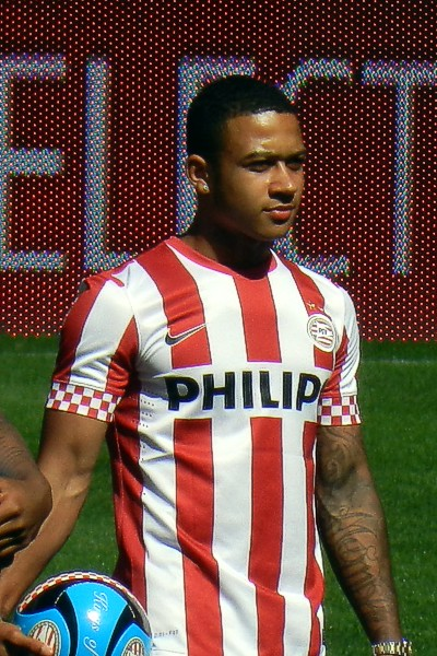 Memphis Depay op de open dag van PSV, 1 augustus 2012.